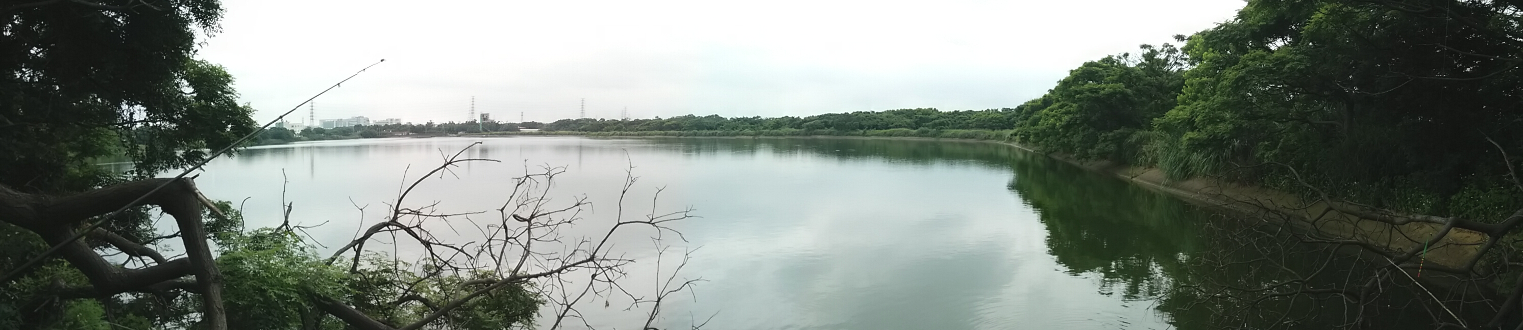 中文（台灣）: 位在湖口鄉鳳山村榮光路(新竹工業區旁)的埤塘